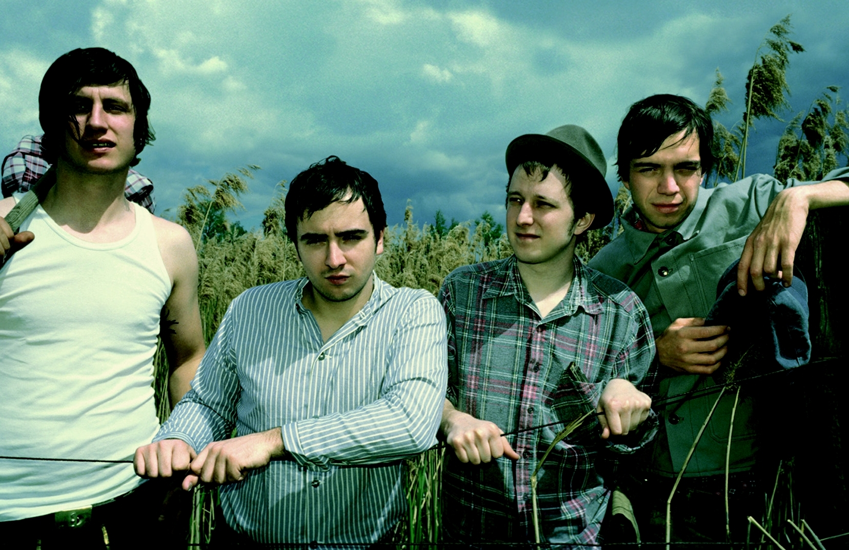 German Band Virginia Jetzt!